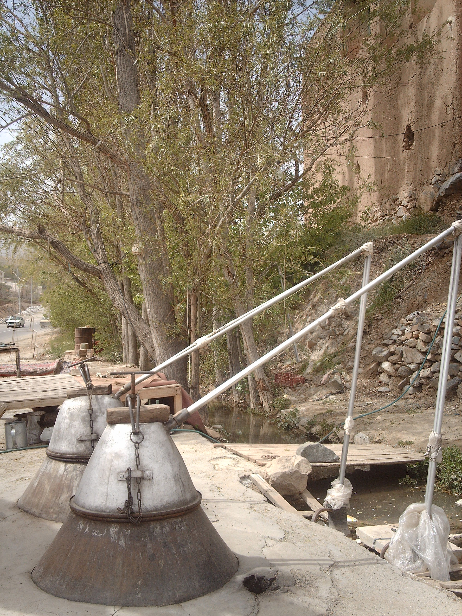 گلاب گیری کاشان